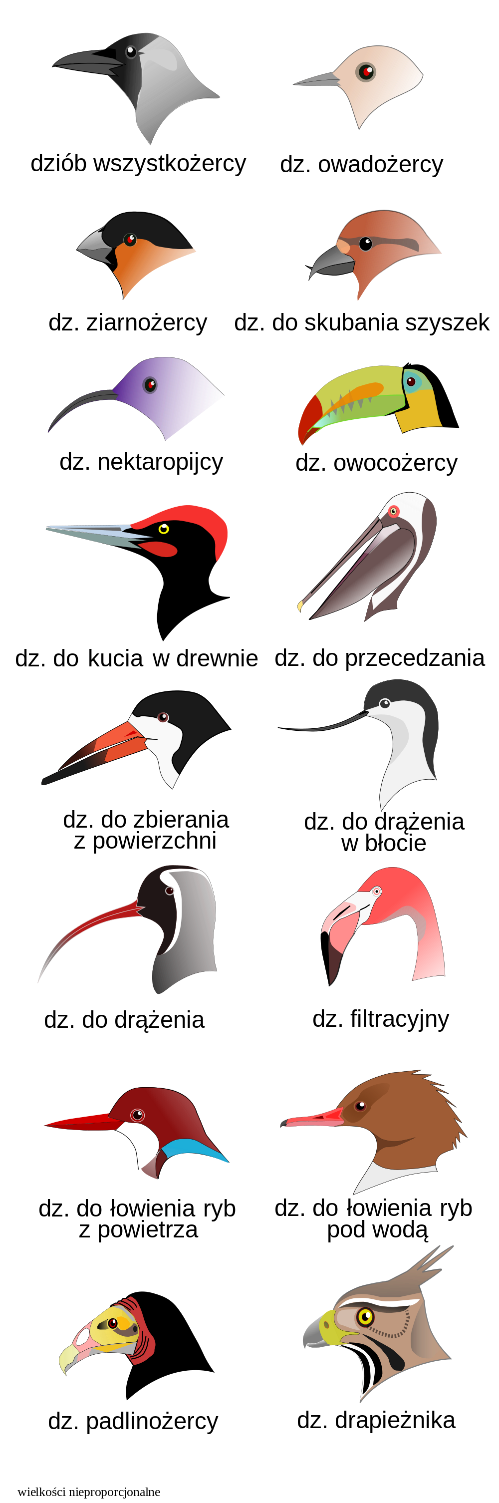 Adaptacja dziobów ptaków